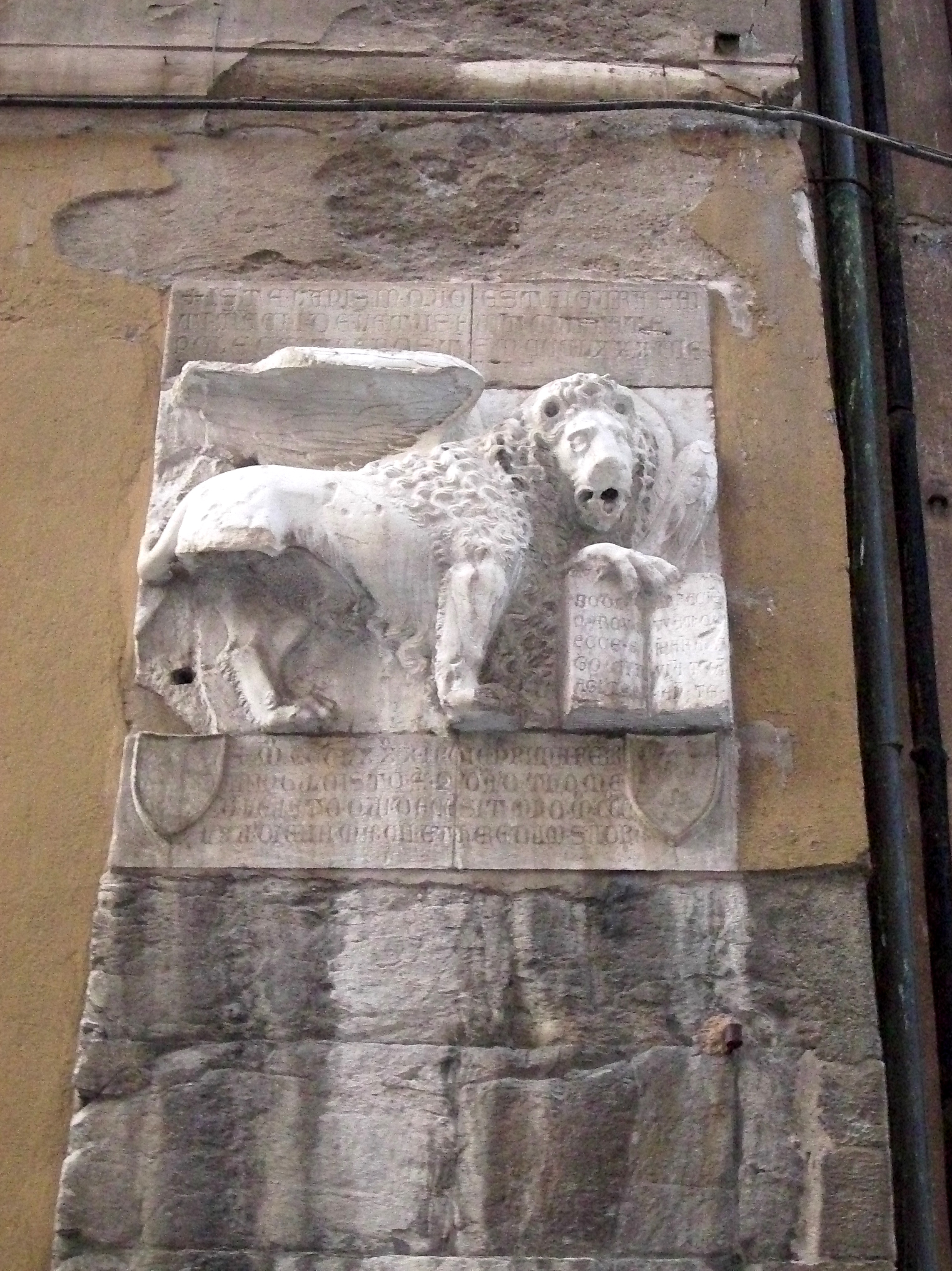 Muro laterale della chiesa di San Marco al Molo di Genova. Leone di San Marco saccheggiato dai genovesi alla città di Pola nel 1380, posto sul fianco della chiesa